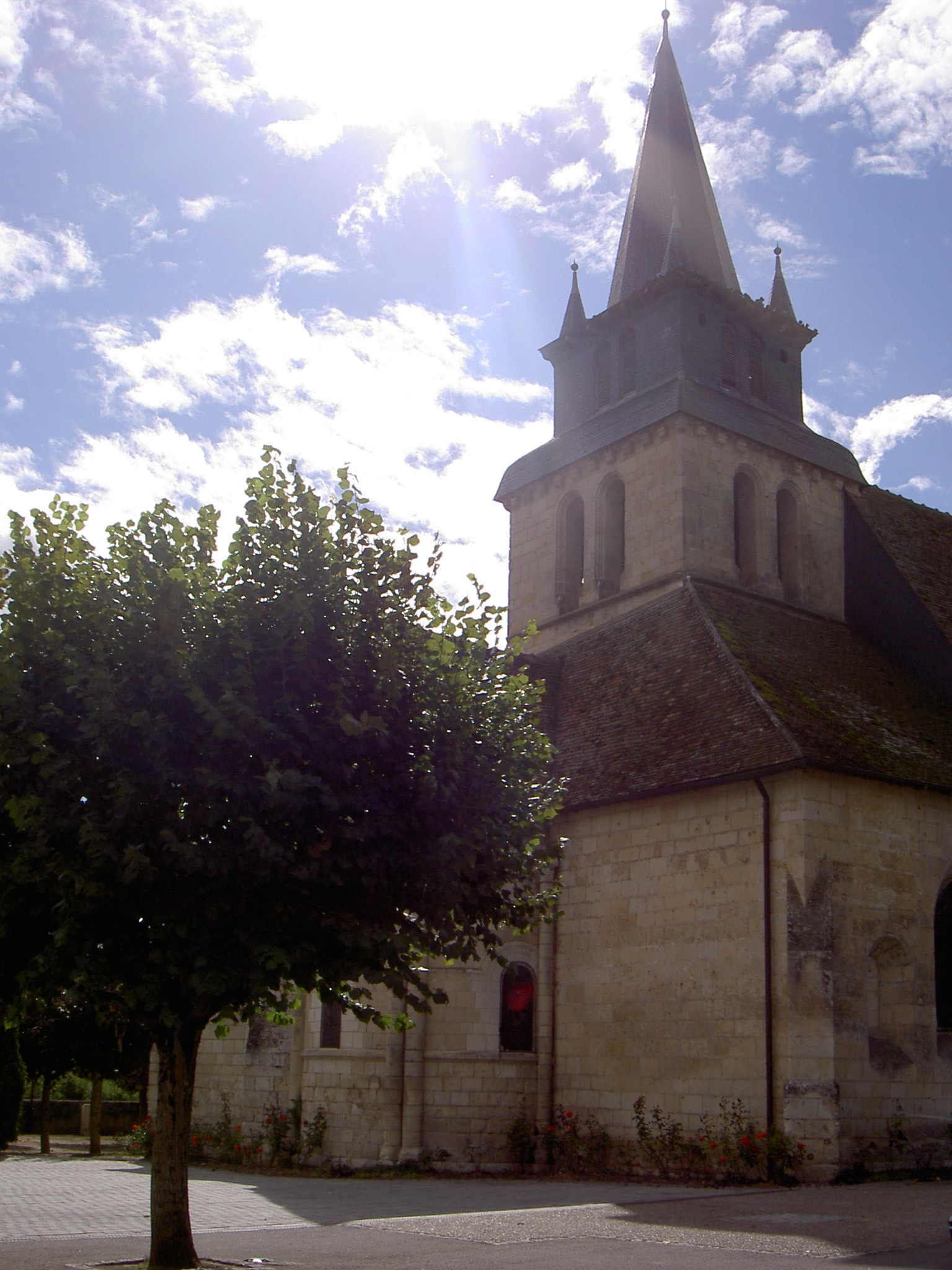 PA00097770